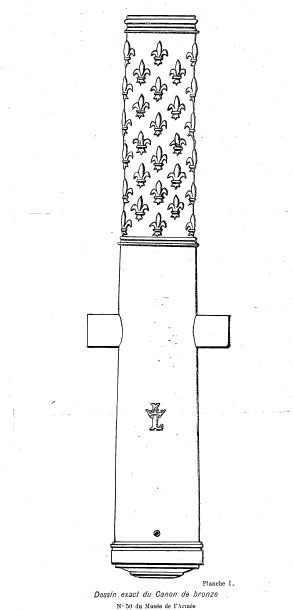 Canon trouvé à la Kalâa des Béni Abbès (Algérie).